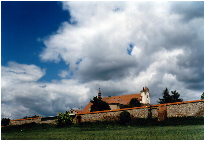 Opatów Opatów - kościół i klasztor OO Bernardynów